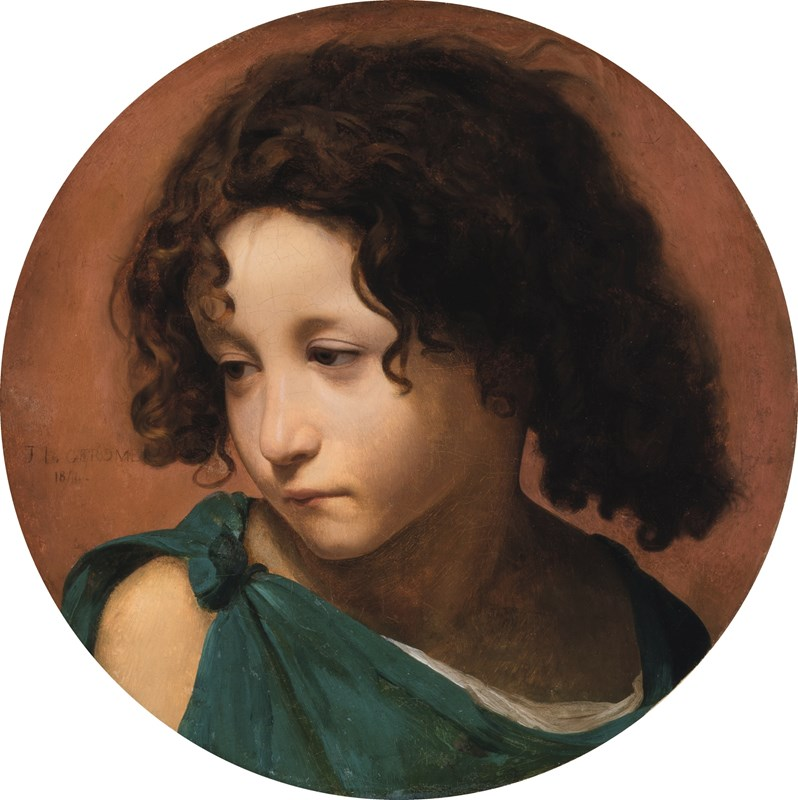 Голова мальчика - первая сохранившаяся картина Жерома